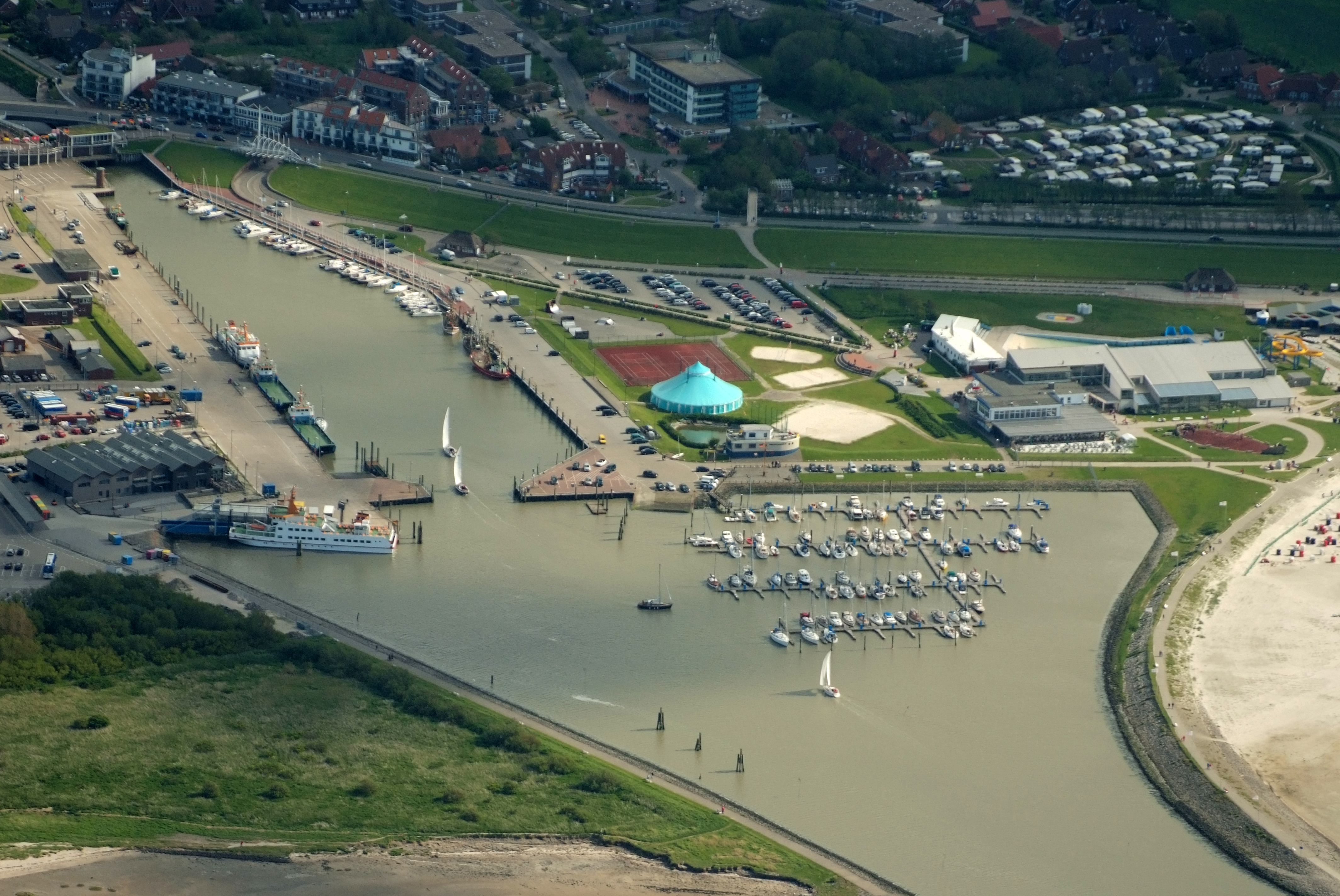 Hafen von Bensersiel Fotoflug vom Flugplatz Nordholz-Spieka über Bremerhaven, Wilhelmshaven und die Ostfriesischen Inseln bis Borkum